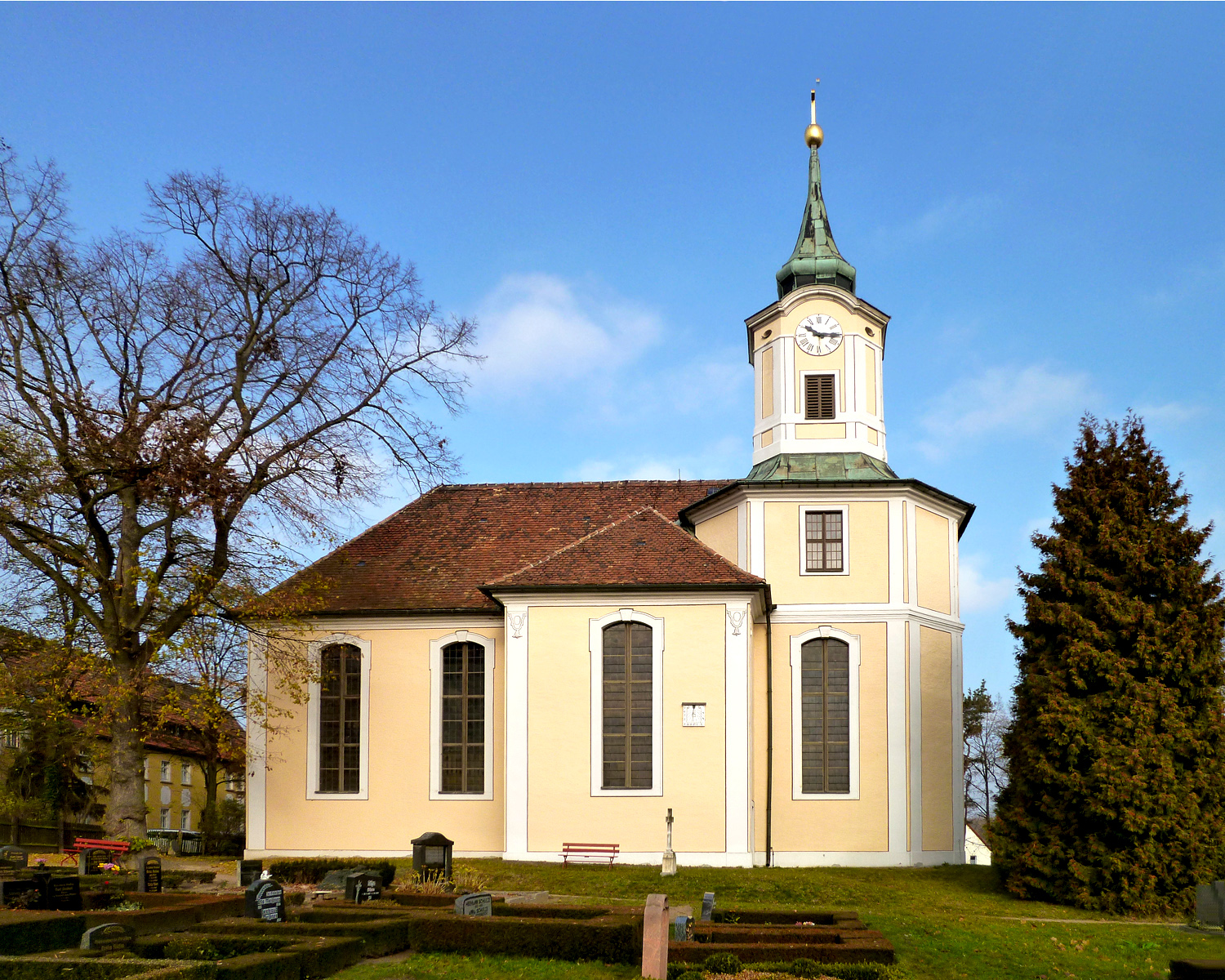 Kirche (George-Bähr-Kirche) Sonnenuhr, Torgauer Straße in Dahlen Stt Schmannewitz